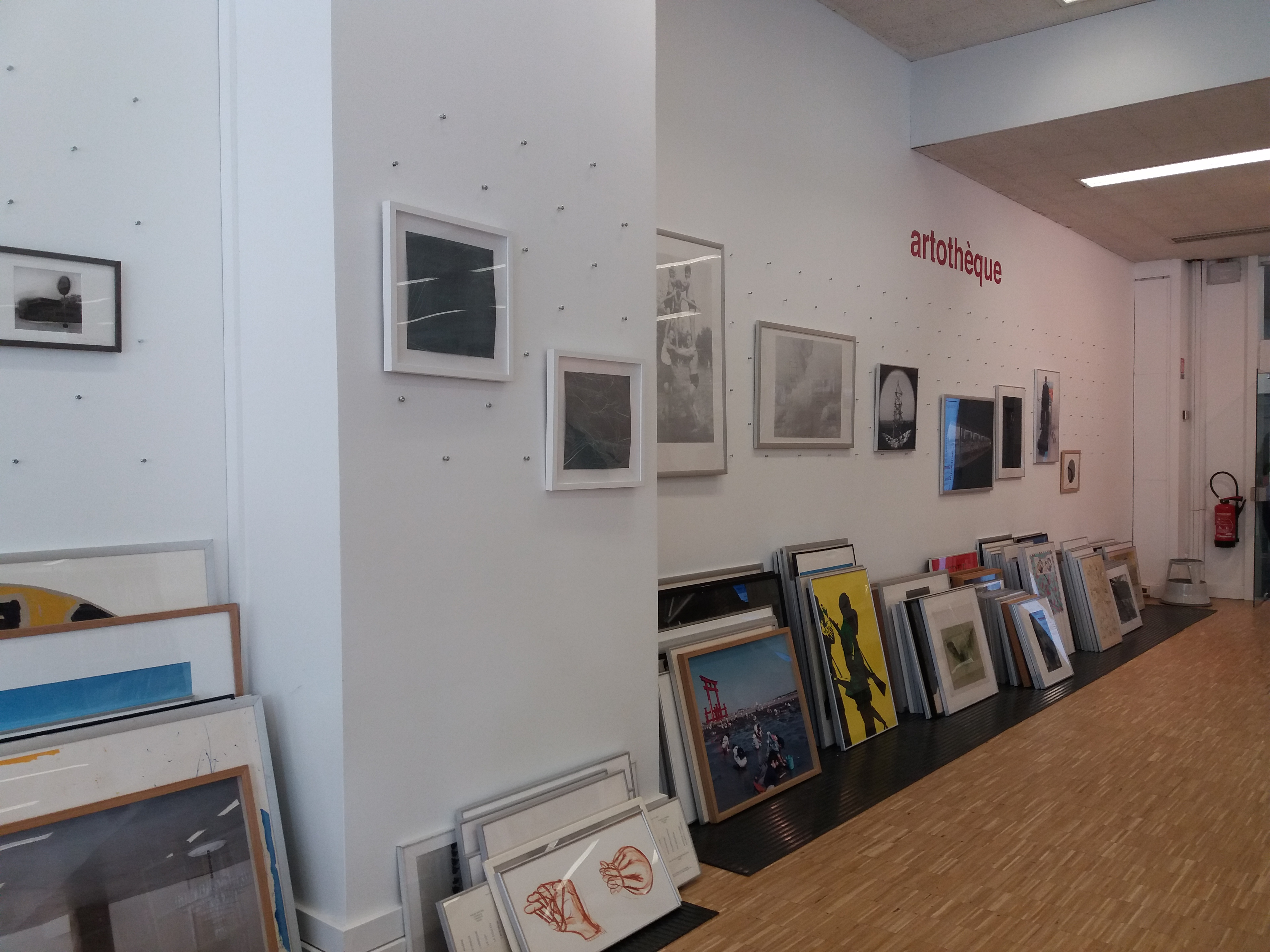 Artothèque.